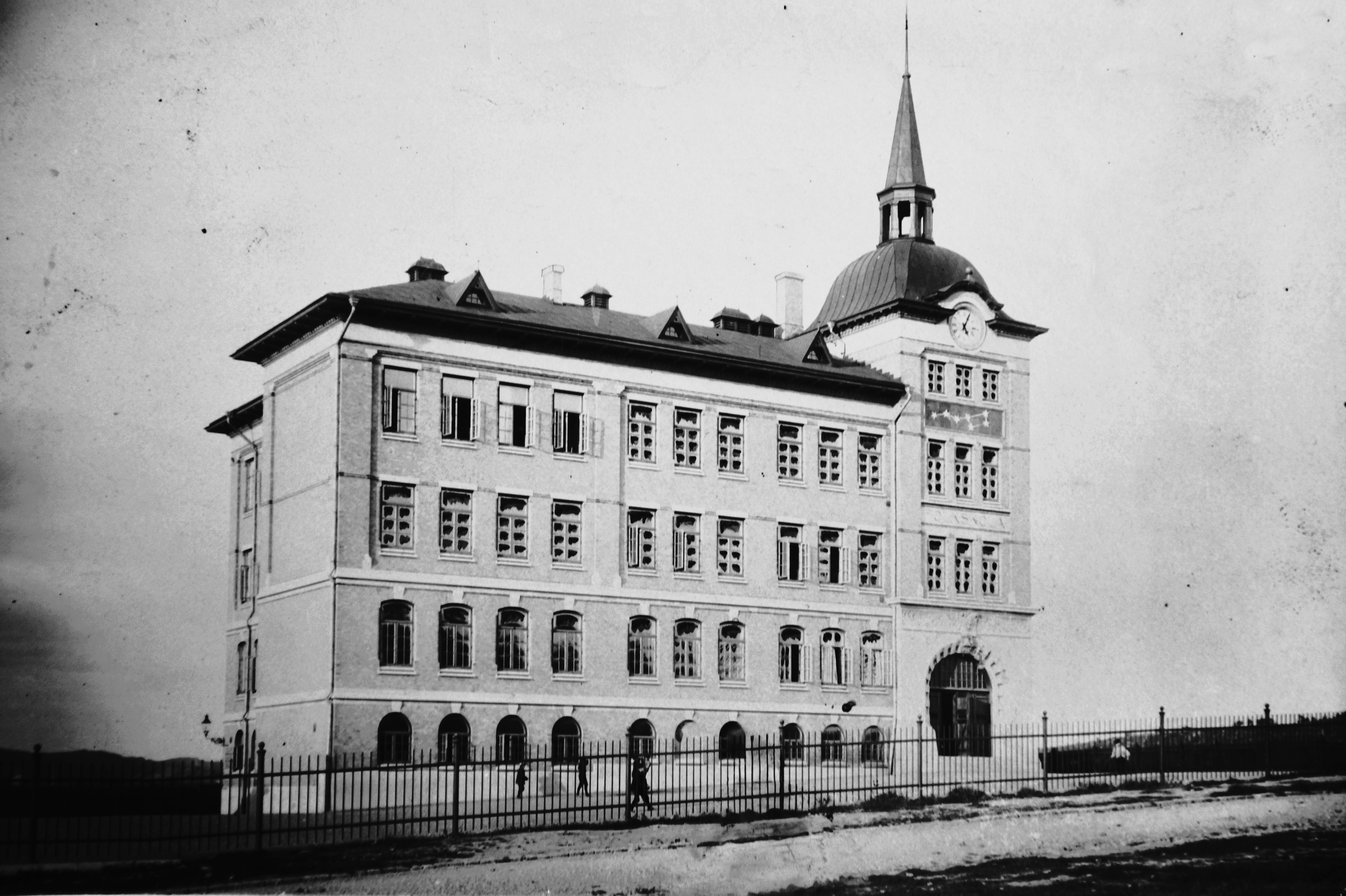 Redbergslids folkskola (nuvarande Ånässkolan) vid Falkgatan 8 i stadsdelen Olskroken. Uppfördes åren 1902-1903 efter ritningar av Yngve Rasmussen. Foto från före 1929 då östra flygeln byggdes.